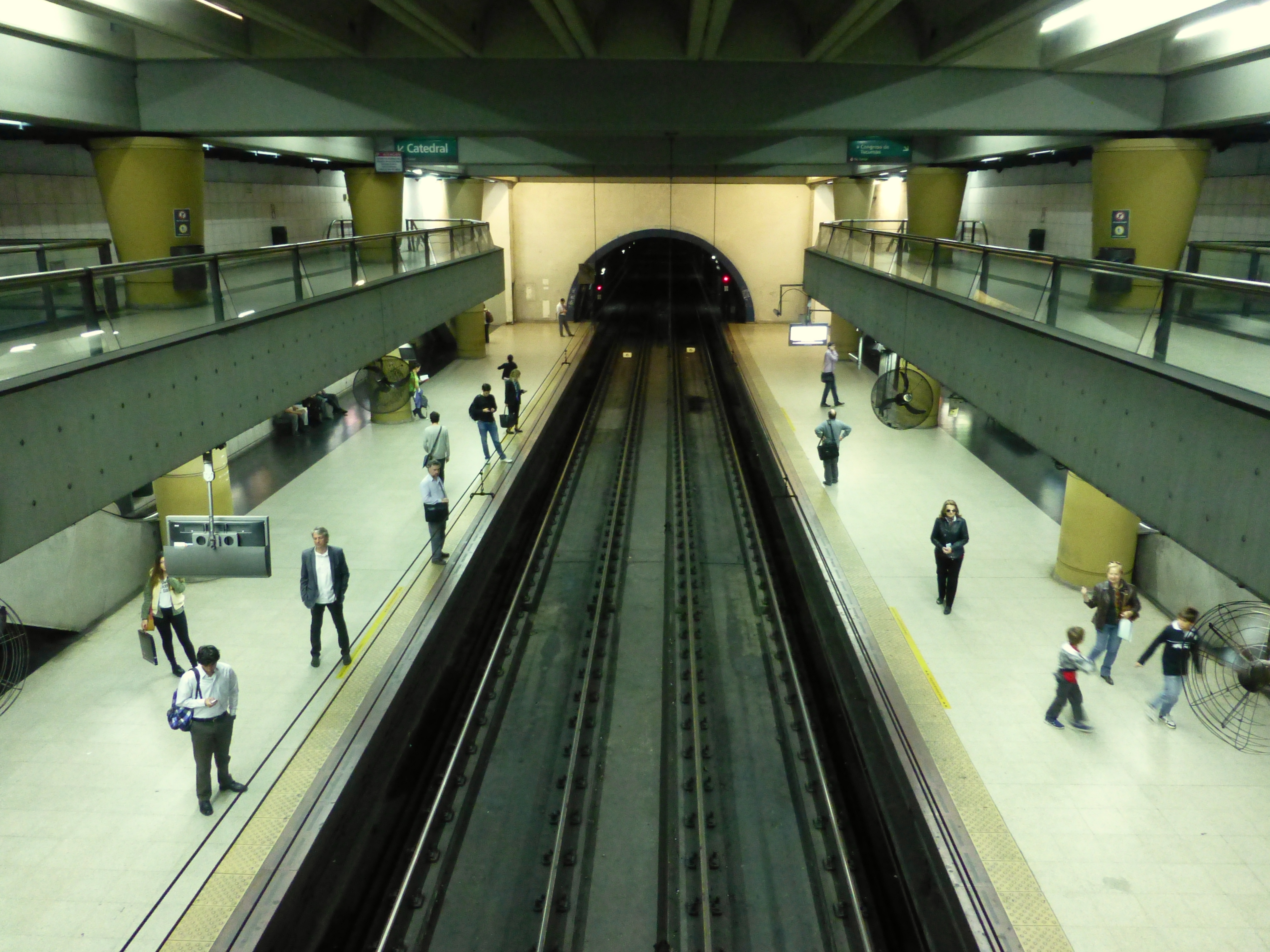 Vista central de los andenes de la estación Olleros, en la línea D del Subte de Buenos Aires.